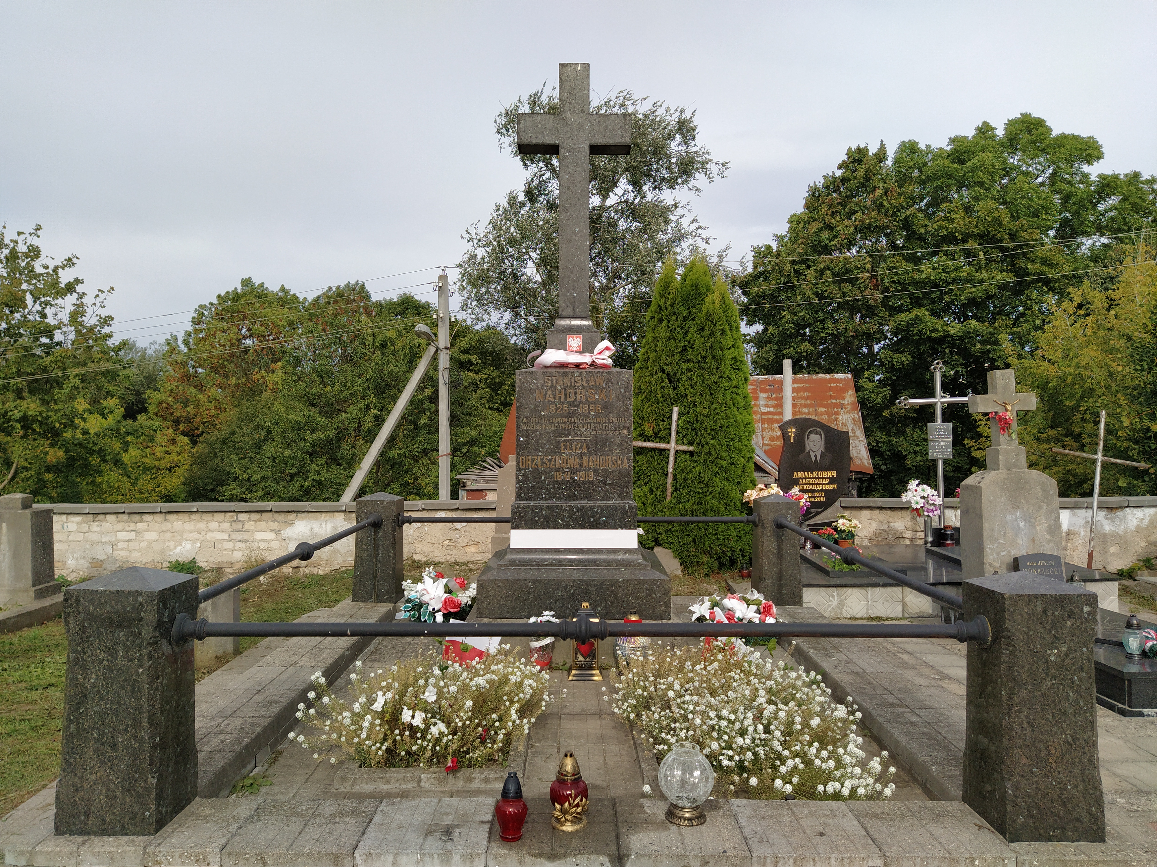 Nagrobek Elizy Orzeszkowej na Cmentarzu Farnym w Grodnie.